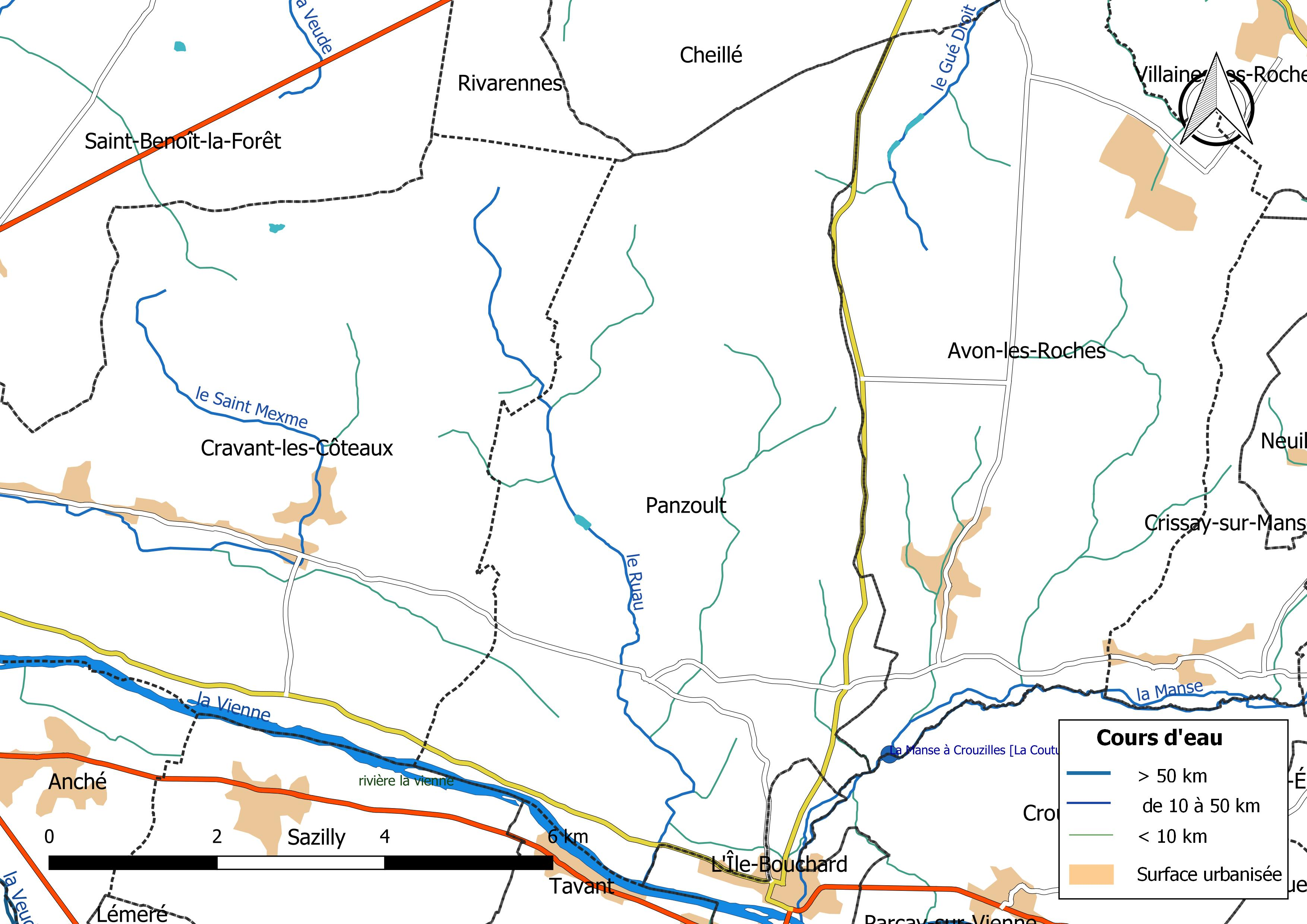 Carte du réseau hydrographique de la commune de Panzoult (France).